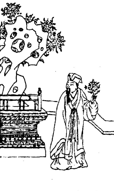 有像列仙全傳《張伯端》